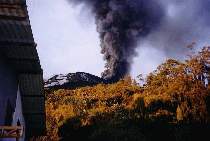 Volcano Tungurahua